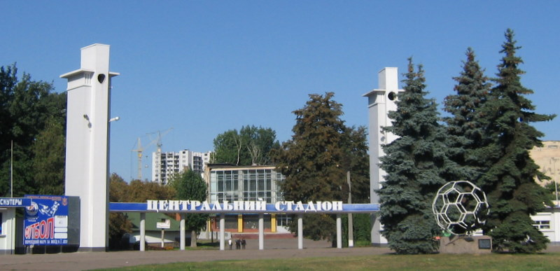 вхід до Центрального стадіону в Черкасах